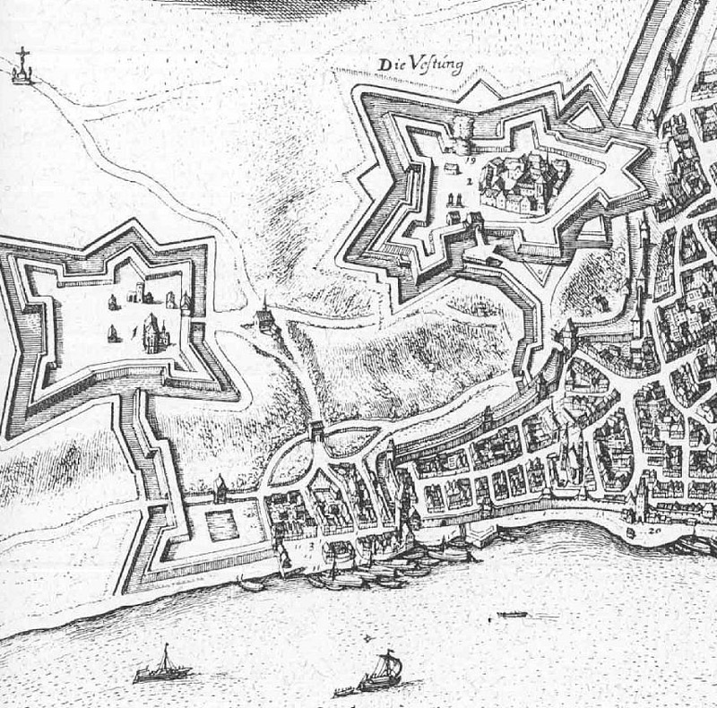 Detailausschnitt Vilzbach bei Mainz aus u.g. Bild